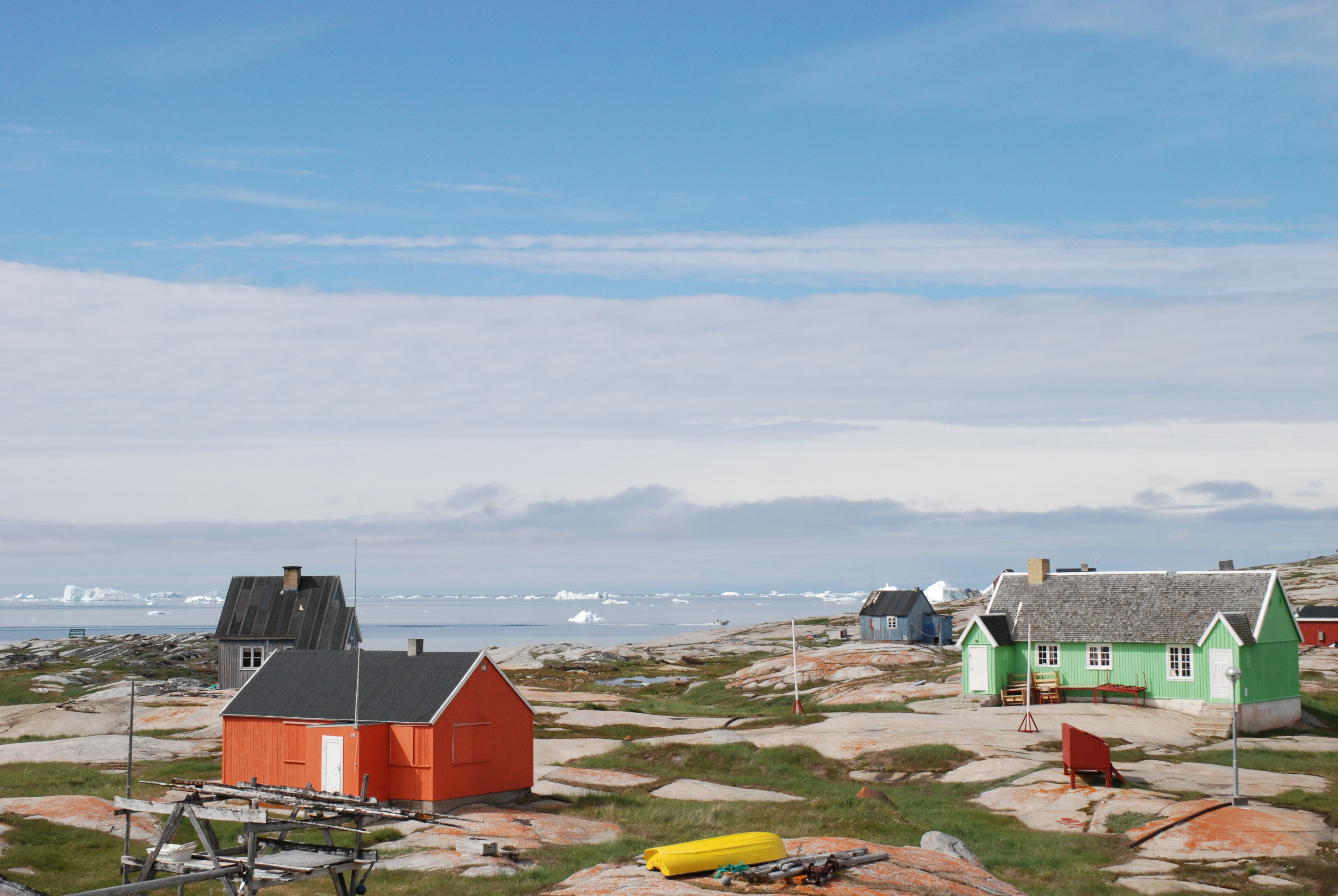 Grønland